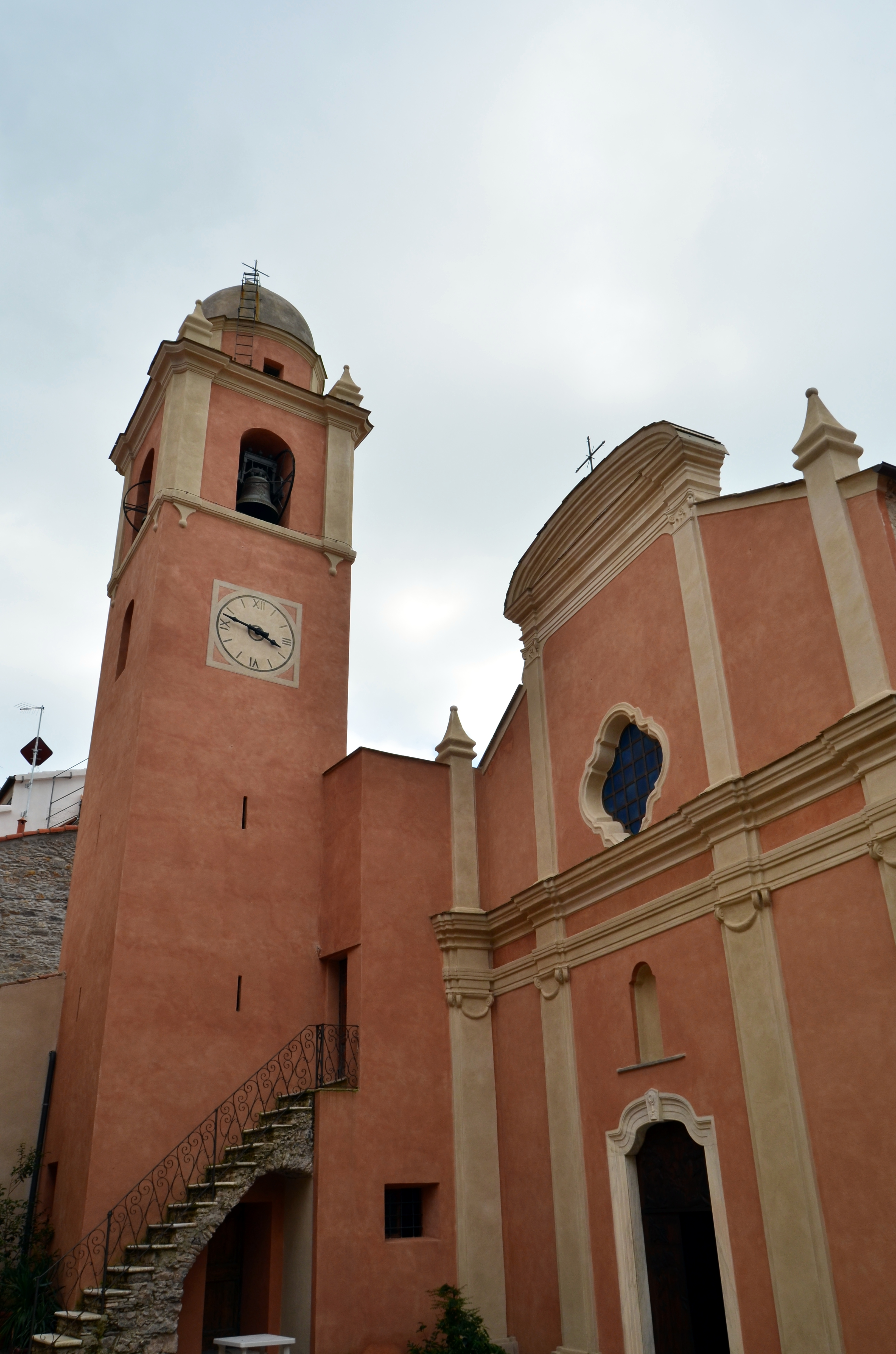 La chiesa di San Pietro, Montemarcello, Ameglia, Liguria, Italia